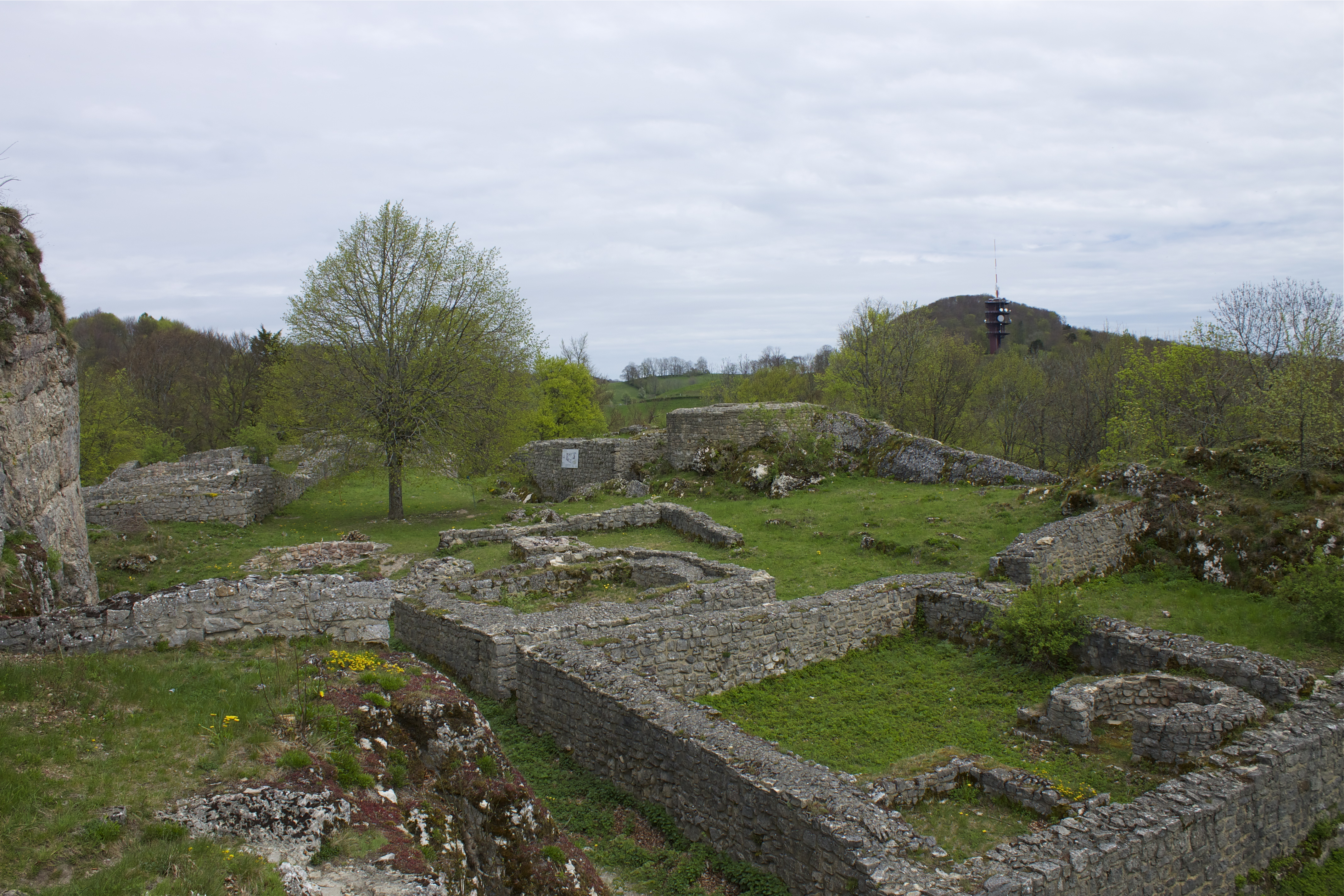 Ein Teil der Ruine Frohburg in Trimbach